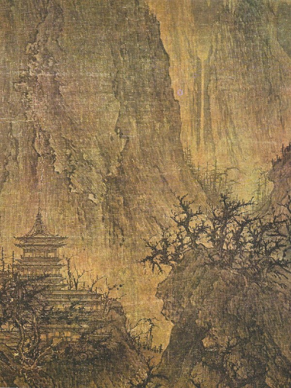 Attribué à Li Cheng. Xe siècle. Temple bouddhiste dans les montagnes. détail d'un rouleau vertical, encre et couleur légère sur soie. Kansas City (Kansas) William Rockhill (Nelson Gal. of Art).